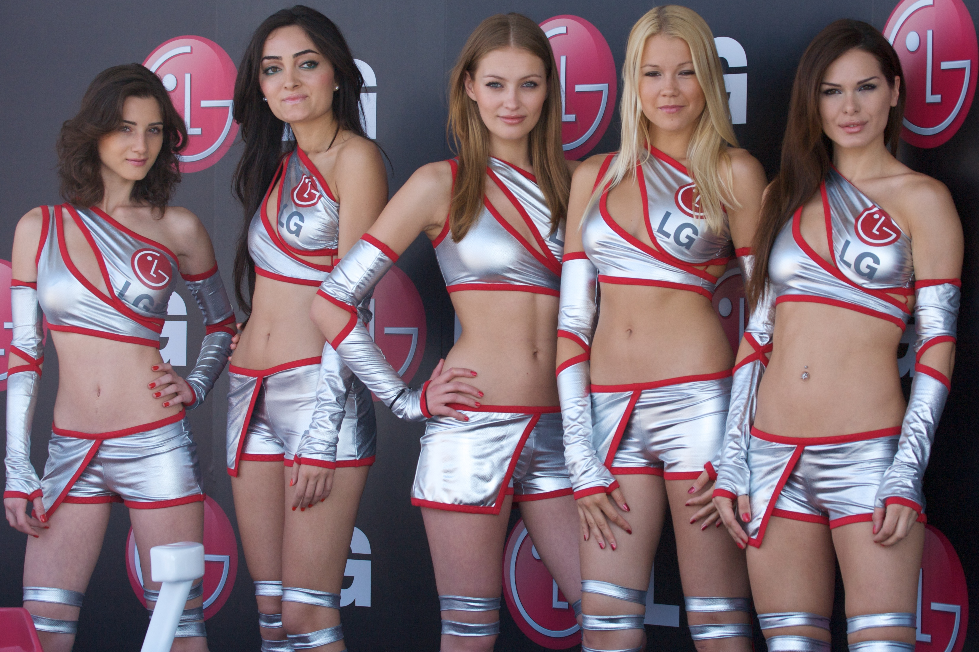 LG girls